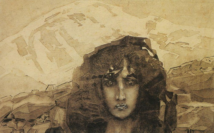 Vrubel demon 1891.jpg: акварель